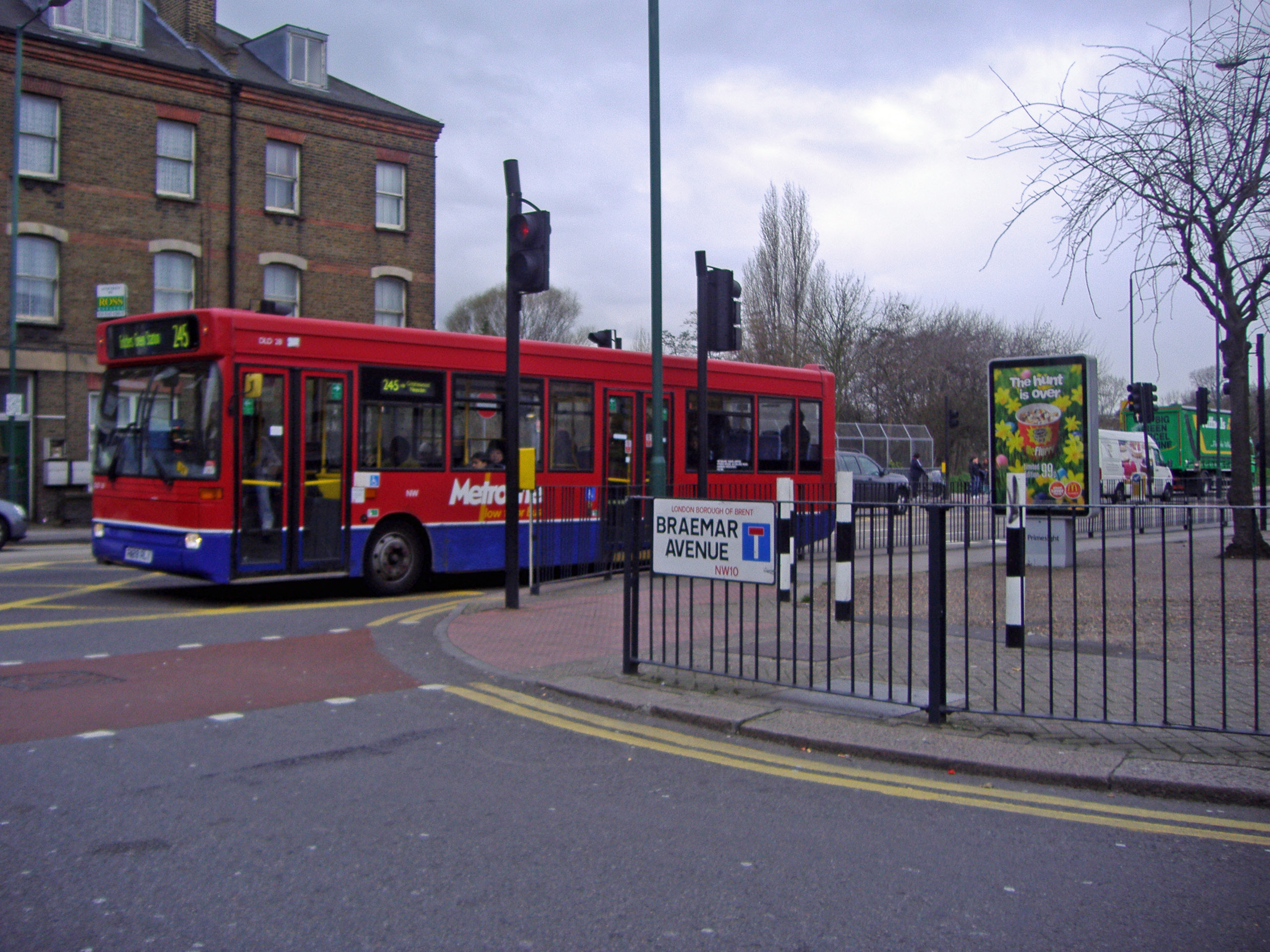 Braemar 245